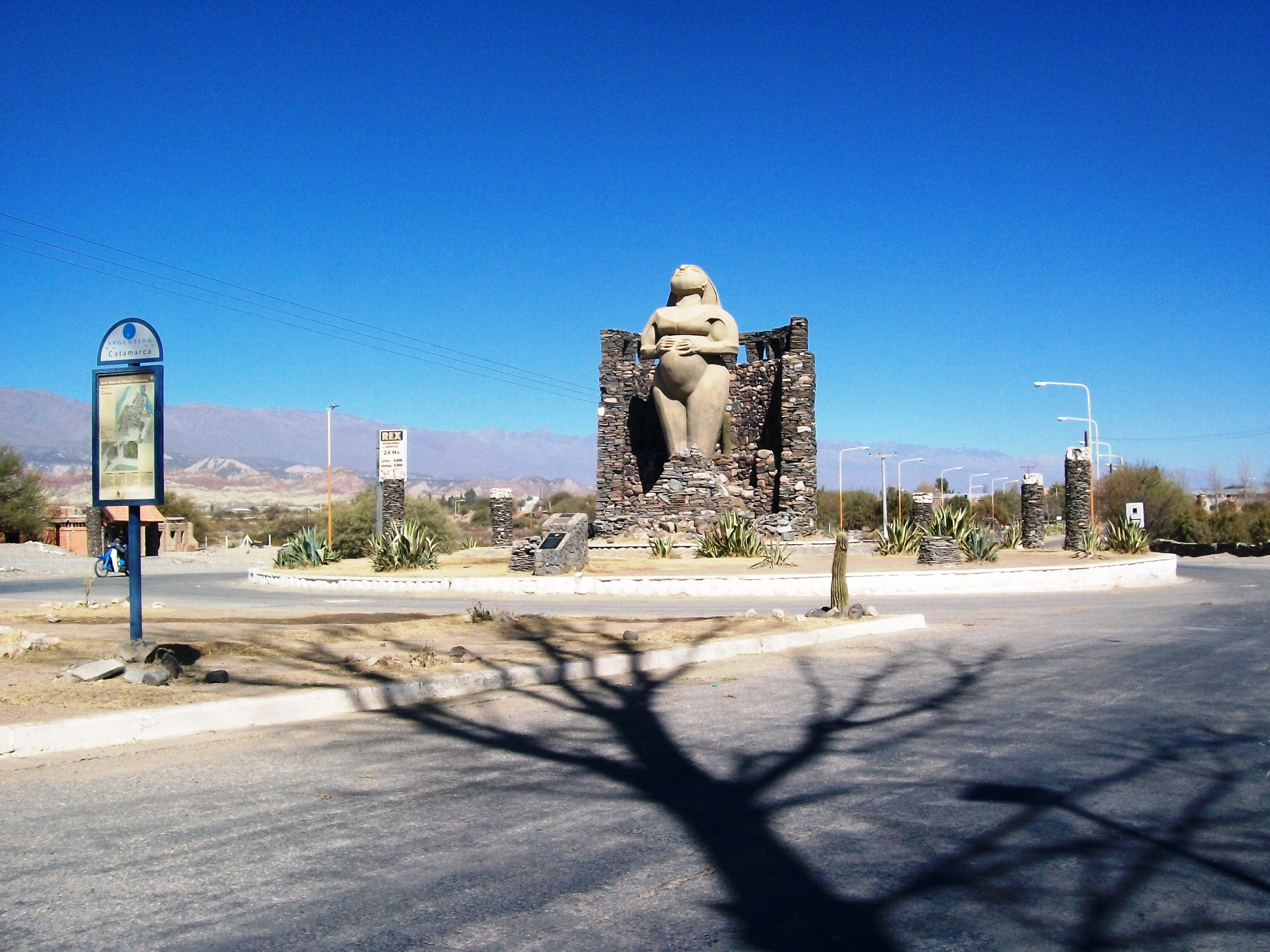 Monumento a la Pachamama en el ingreso norte de la ciudad, , Santa María de Jikavil, Catamarca, Argentina